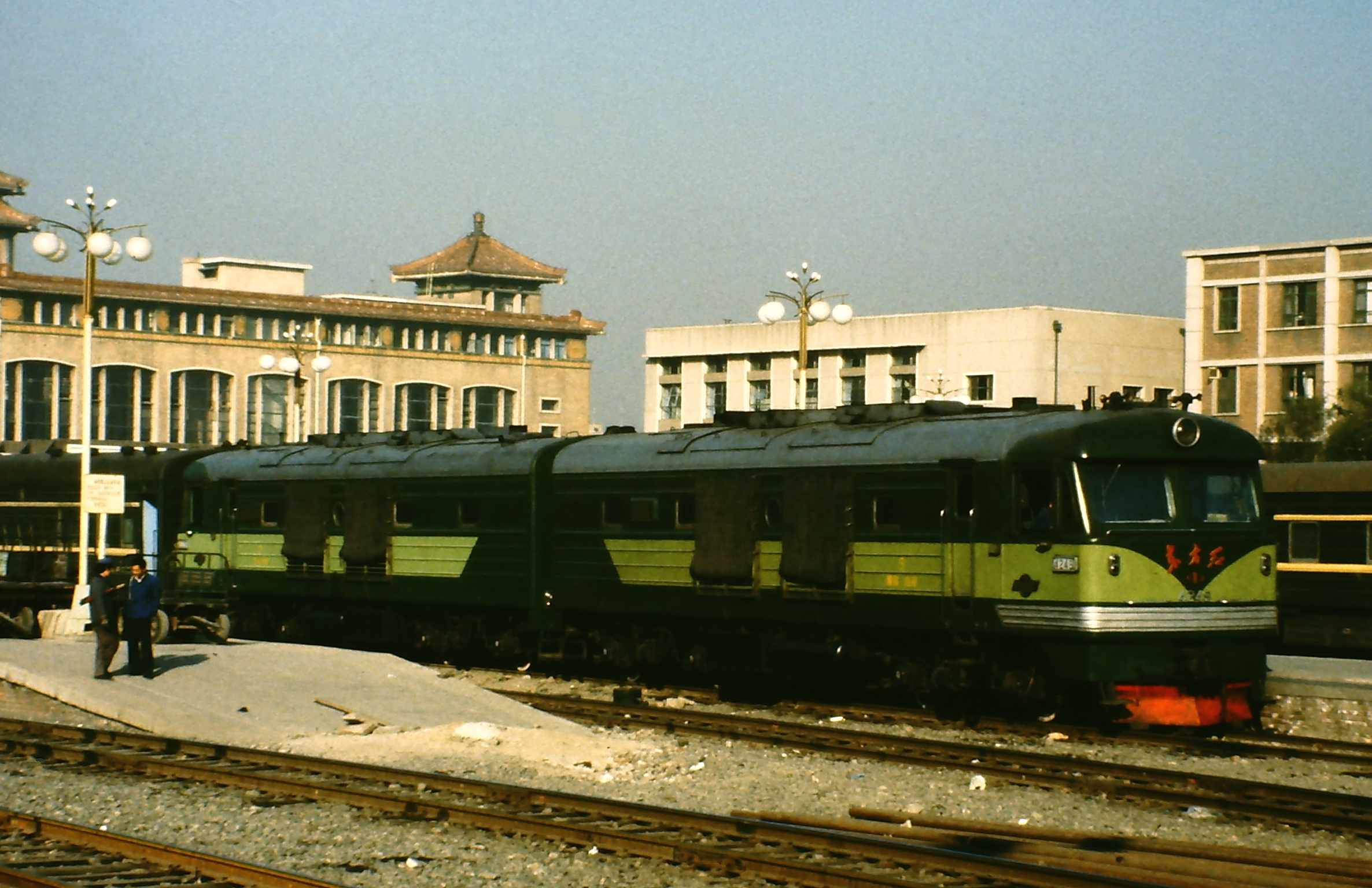 CNR DFH1-4245 (Beijing Hauptbahnhof)